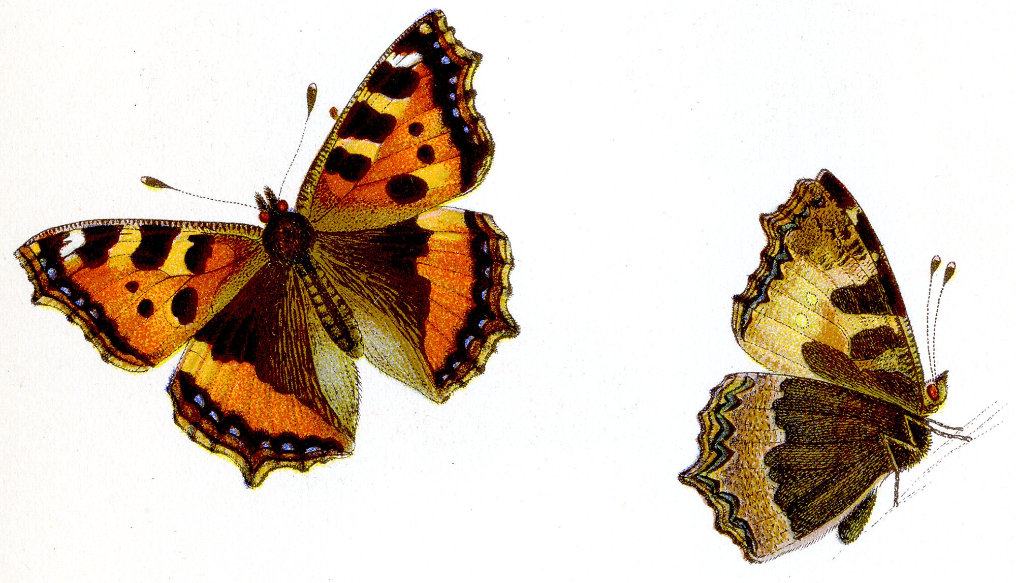 Kleiner Fuchs - Aglais urticae